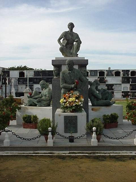 Tumba del cantaor flamenco Antonio Mairena (1909-1983), Mairena del Alcor.